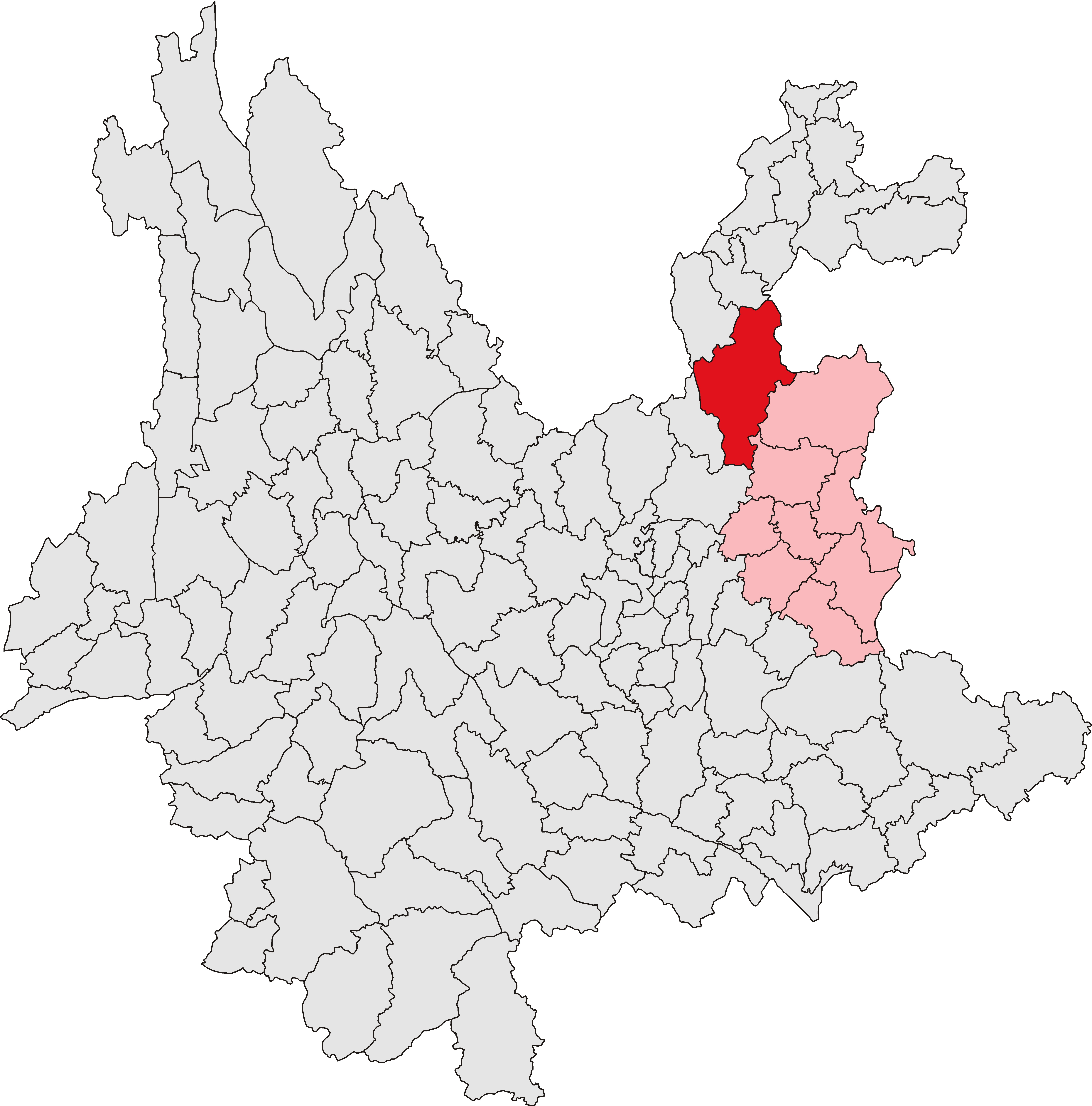 会泽县位置图